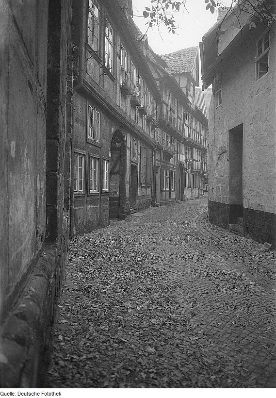 Original image description from the Deutsche Fotothek Quedlinburg. Blick durch eine Fachwerkstraße